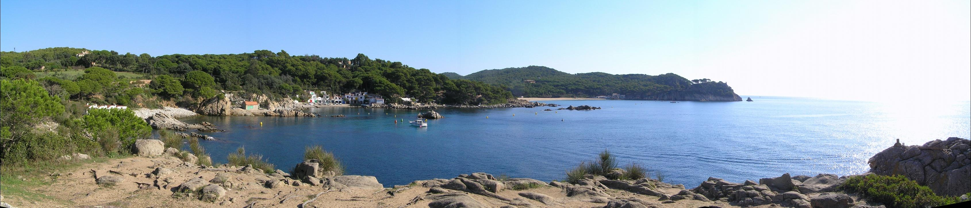 S'Alguer and Castell Beach, Palamós